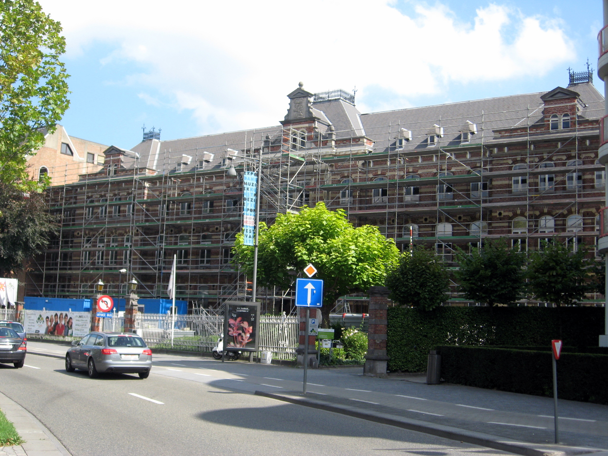 Provinciale School voor Vroedvrouwen van 1912 in Hasselt